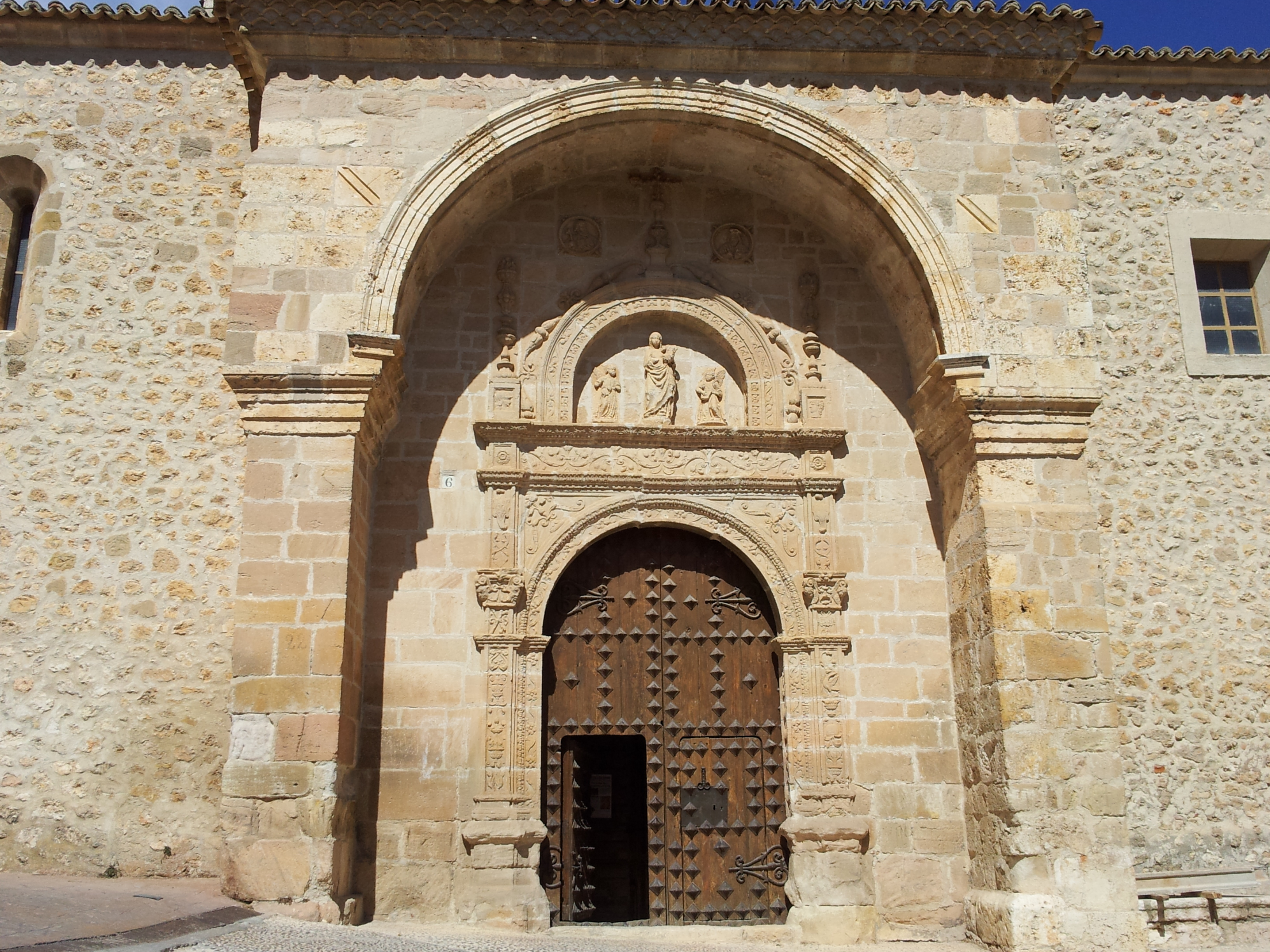 Iglesia Parroquial de Santa Eulalia de Mérida (Peñalver, Guadalajara, España).